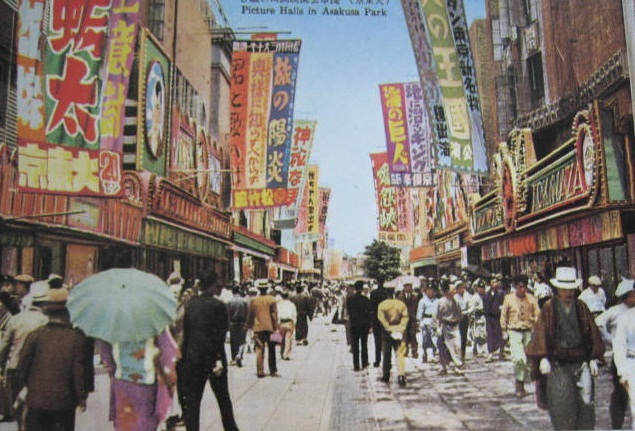 『浅草公園映画街の賑ひ』、浅草公園六区の映画街、（大東京、松竹館、常盤座、東京倶楽部、電気館）、1937年6月の写真